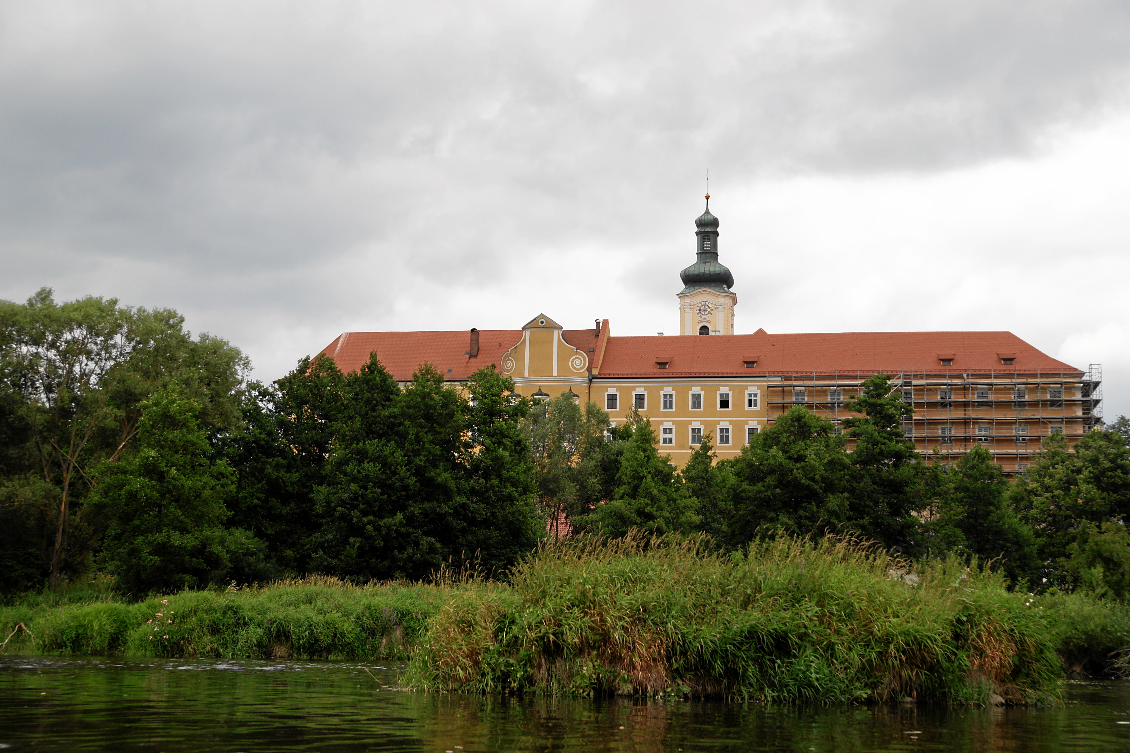 Kloster Walderbach